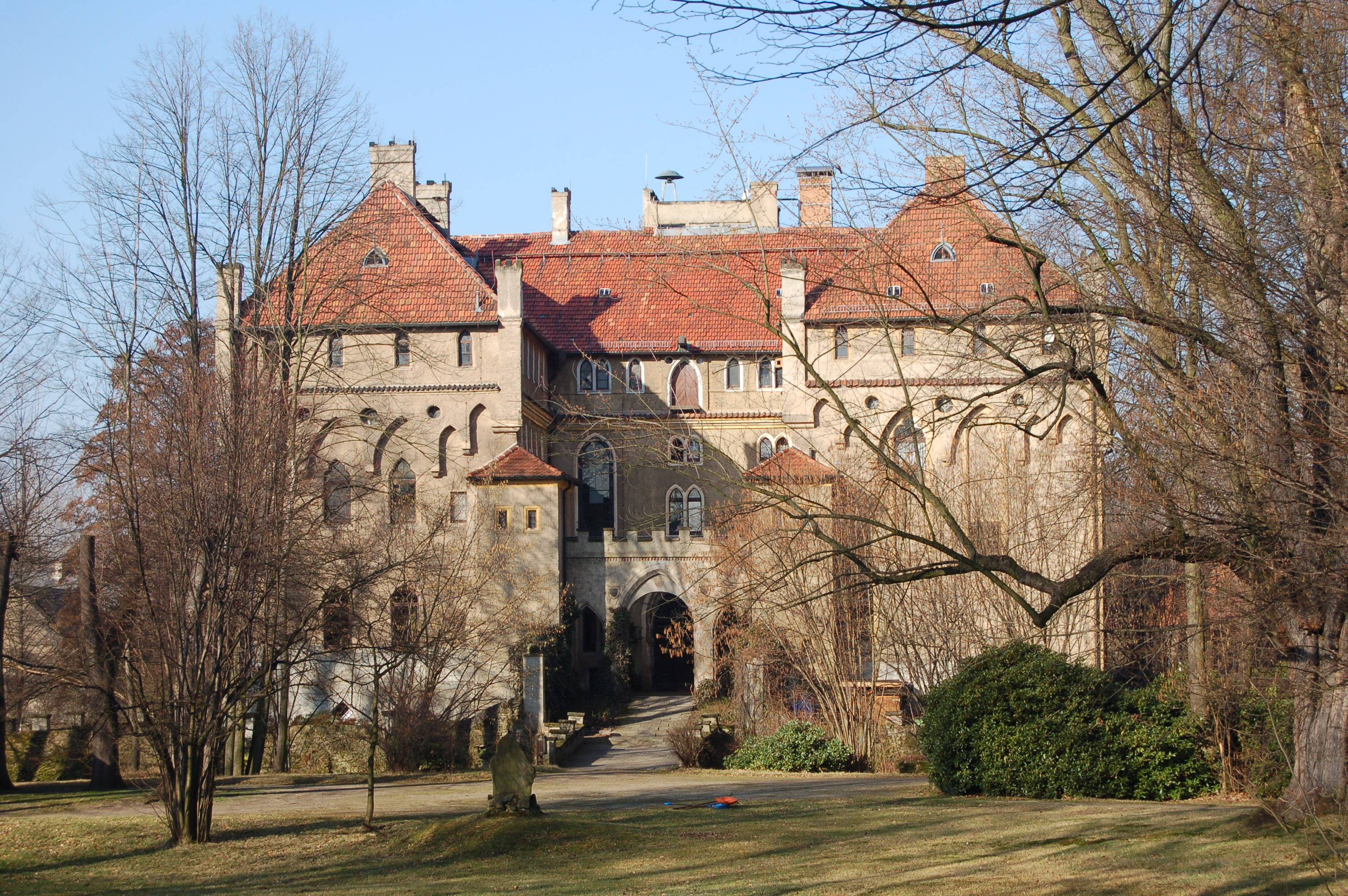 Castle in Seifersdorf (Wachau)